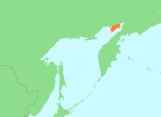 Location Tajgonos.PNG